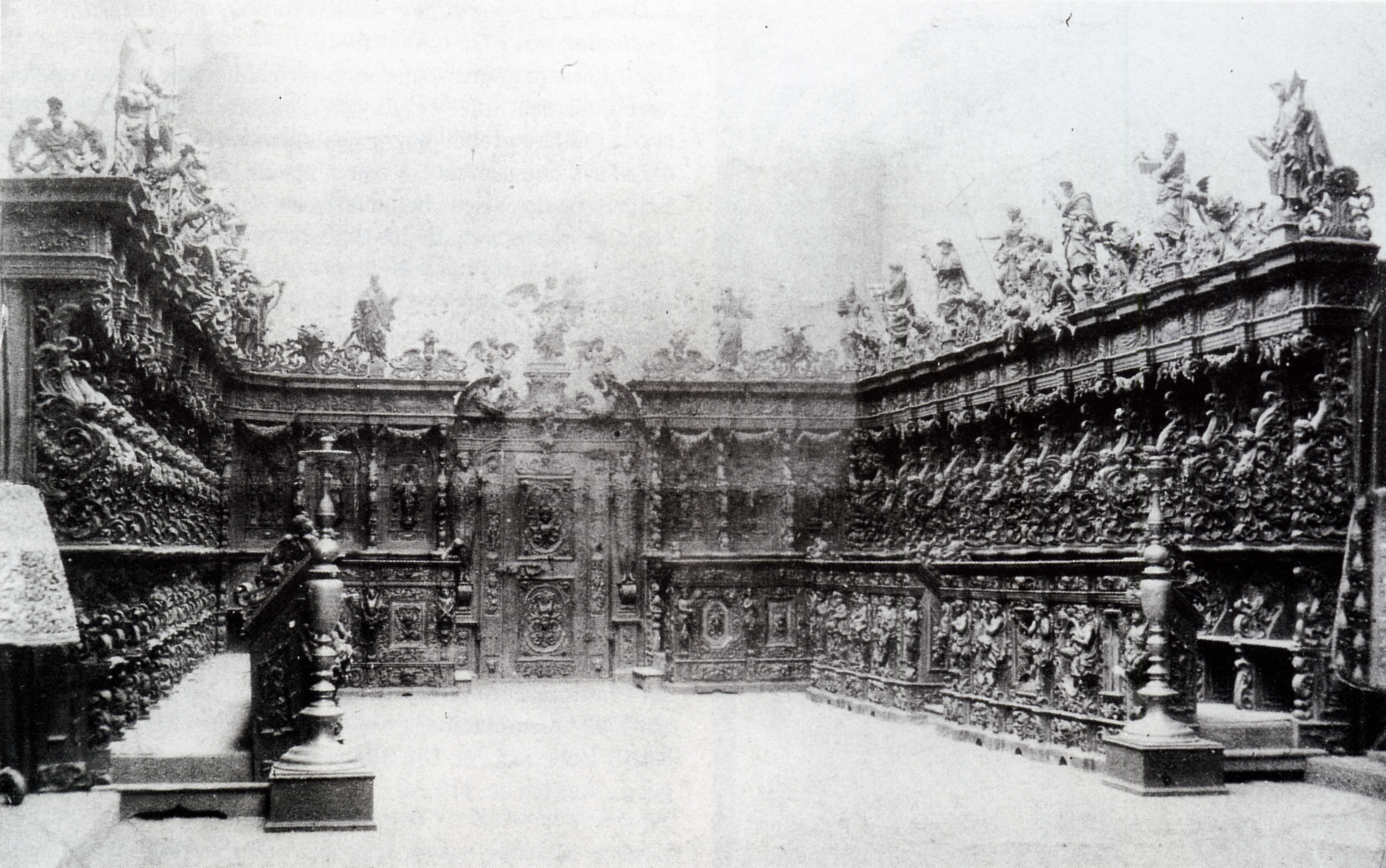 Das Buxheimer Chorgestühl der ehemaligen oberschwäbischen Reichskartause Buxheim; vermutlich in Amsterdam 1886.